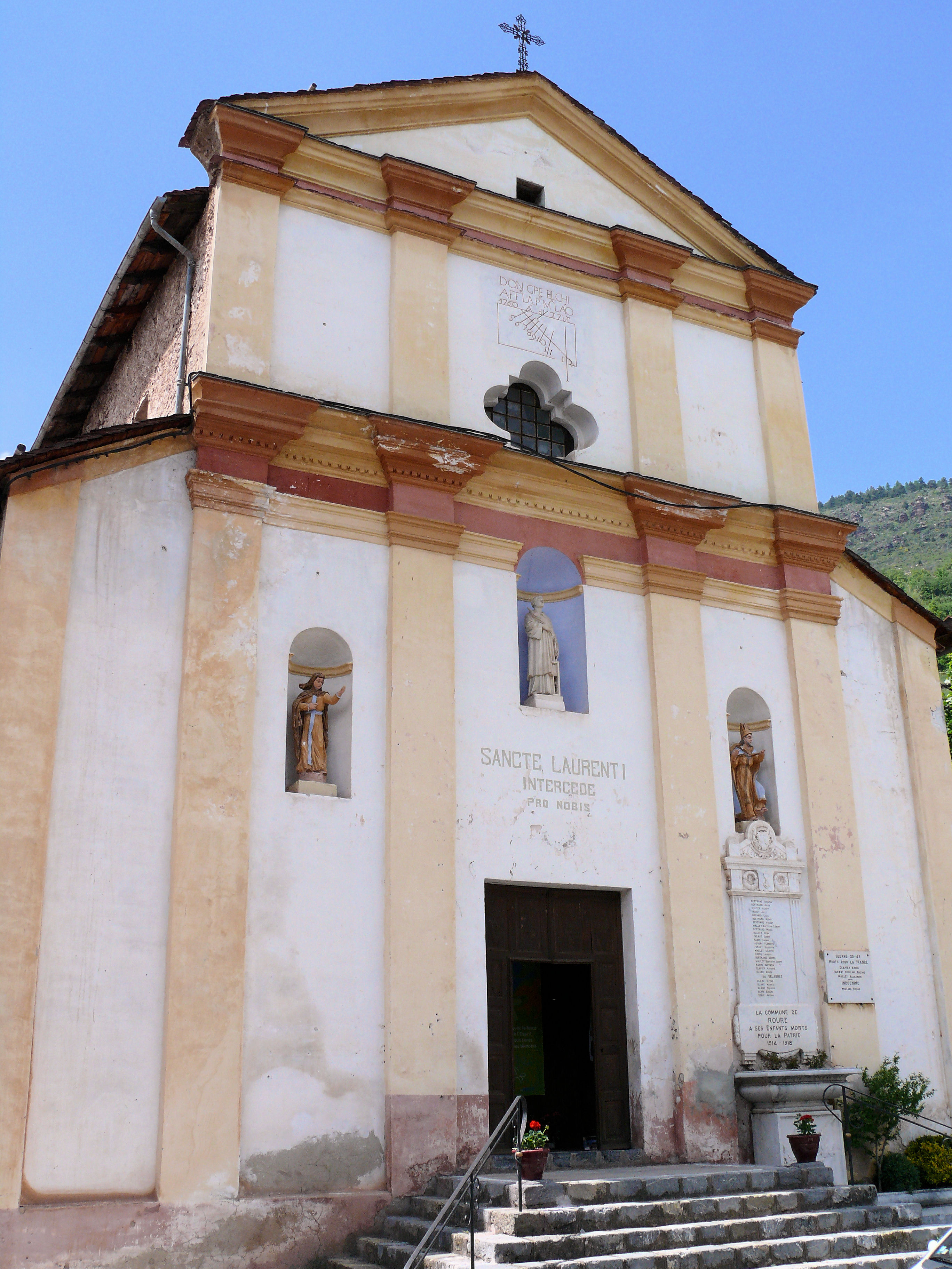 Roure - Eglise Saint-Laurent - Façade